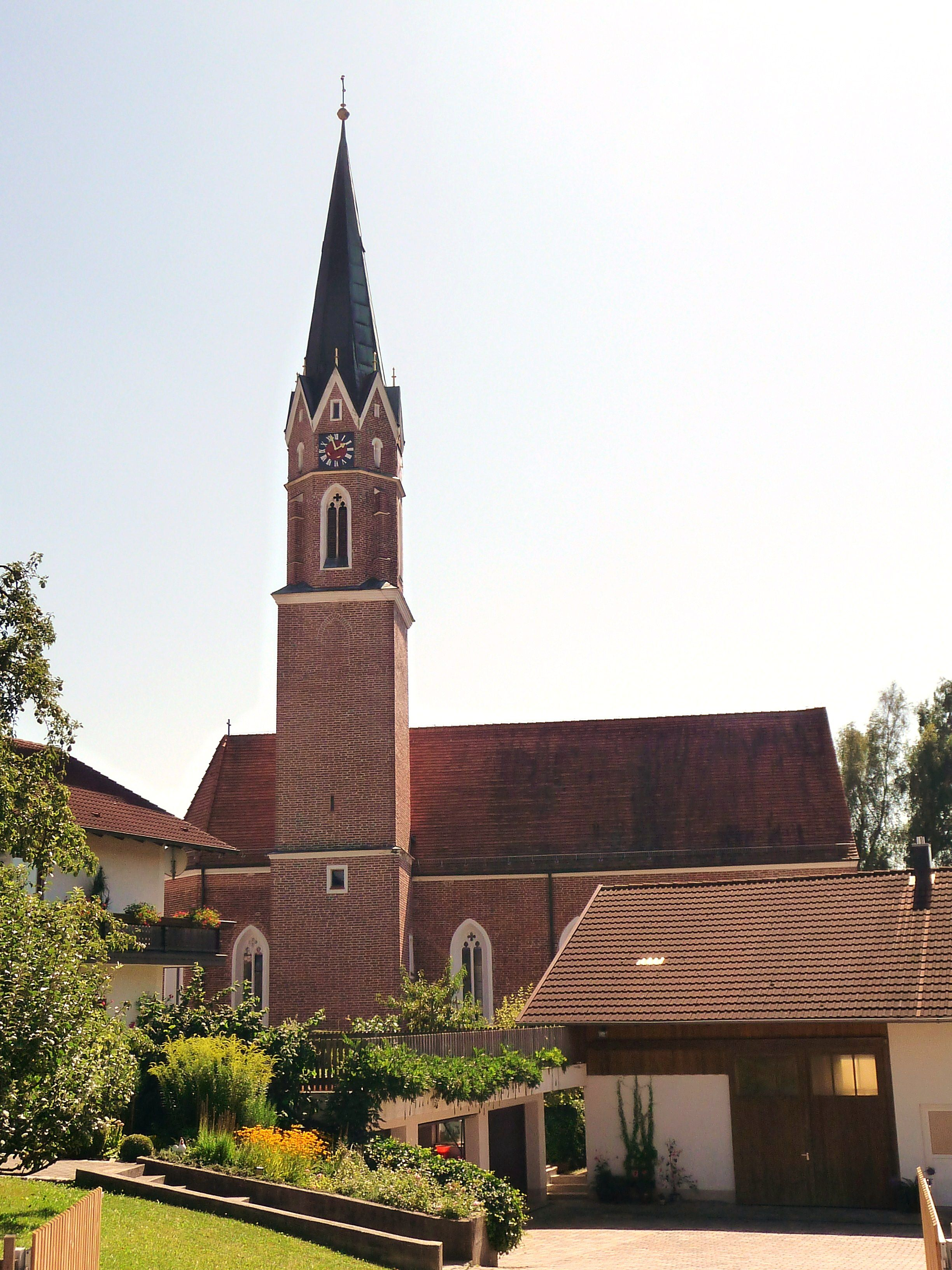 Die Filialkirche St. Nikolaus in Wurmsham.